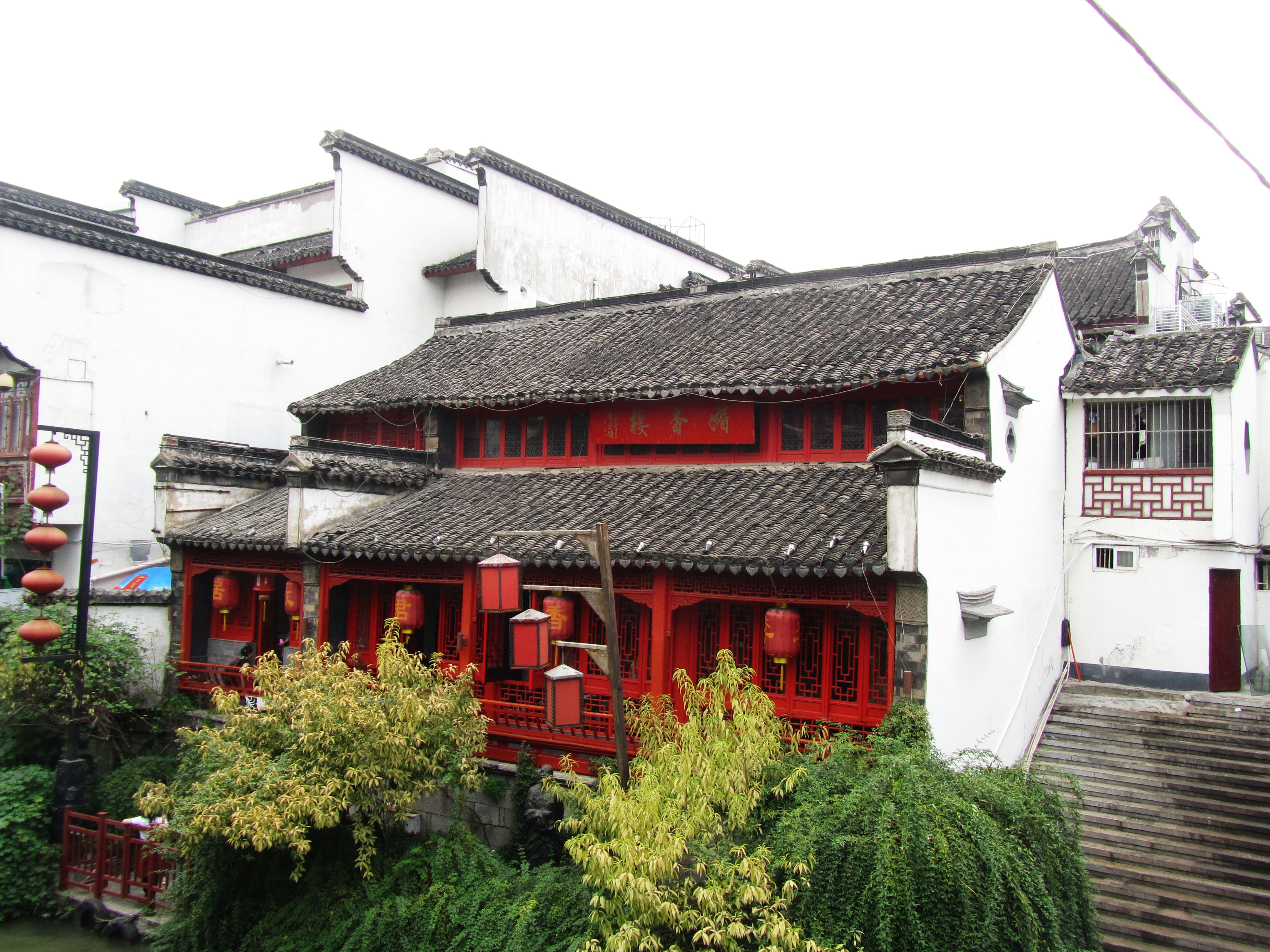 秦淮民居群——钞库街河房，今李香君纪念馆。